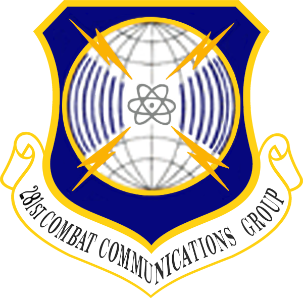 281 CBCG Logo